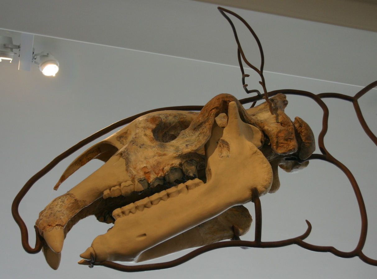 Visit my blog at